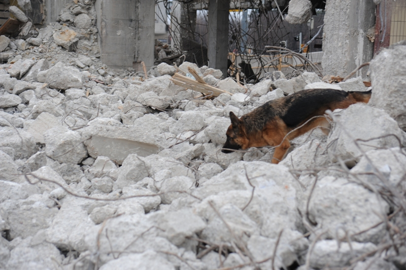 Trümmerhund bei der Arbeit.